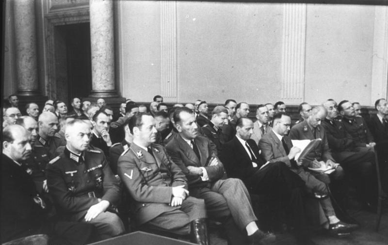 Volksgerichtshof, Dr. Ernst Kaltenbrunner Berlin.- Volksgerichtshof, Prozeß nach dem 20. Juli 1944, Zuschauer, 4.v.l. Dr. Ernst Kaltenbrunner Abgebildete Personen: Kaltenbrunner, Ernst Dr. jur.: SS-Obergruppenführer und General der Polizei, Ritterkreuz (RK), Chef des Reichssicherheitshauptamtes, Deutschland.